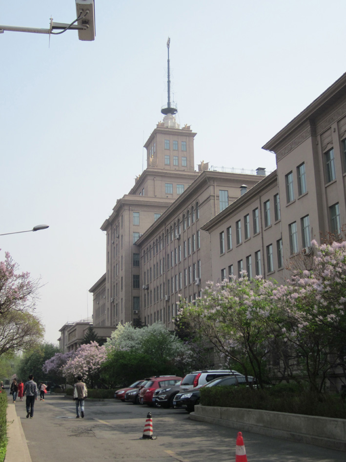 ハルビン工業大学本館